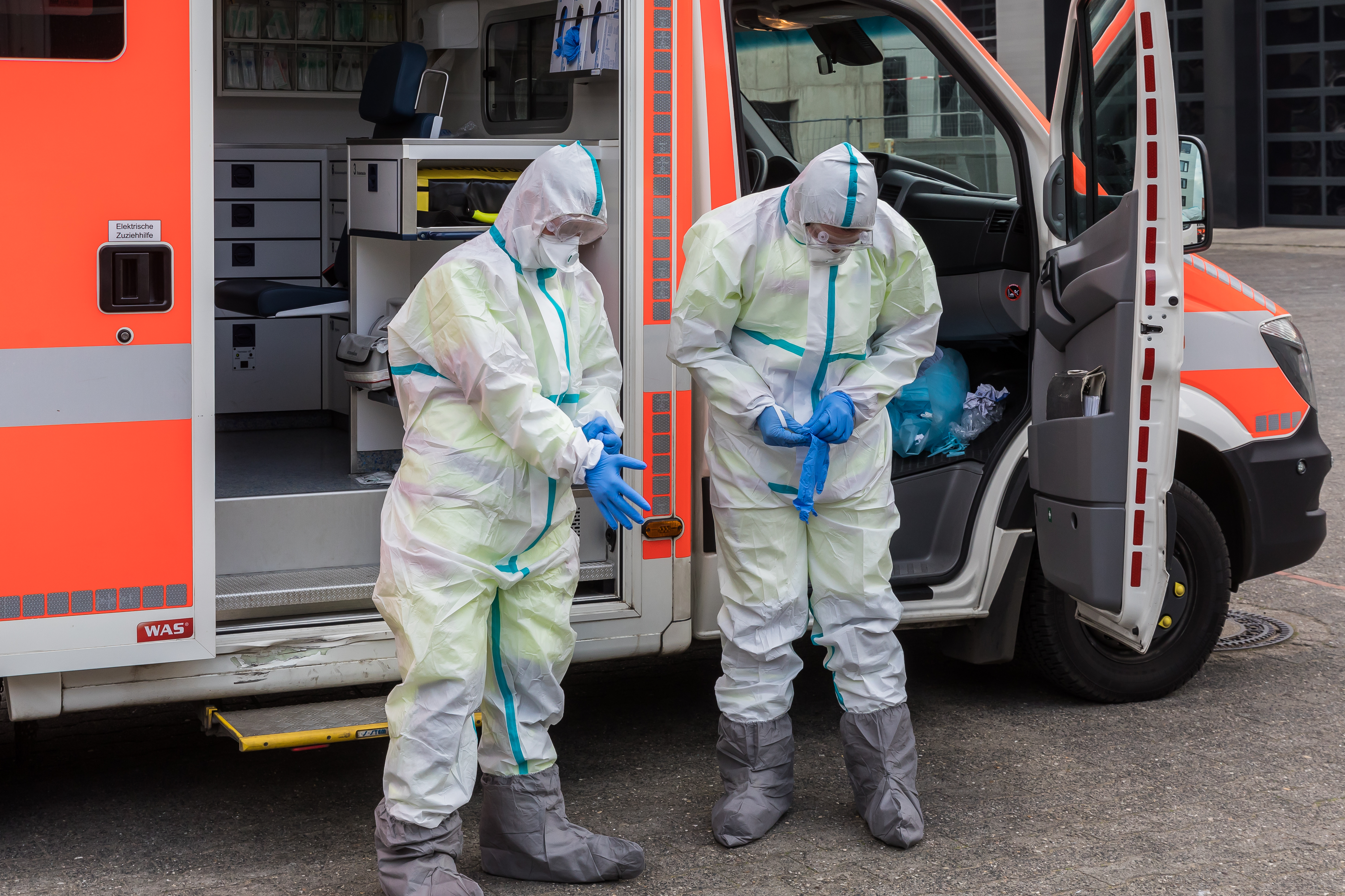 Rettungsdienst der Stadt Köln - Anlegen der Schutzausstattungen im Hof der Feuerwache 5, Köln-Weidenpesch Foto: Zwei Mitarbeiter des Rettungsdienstes mit FFP3-Masken als Mund-Nasen-Schutz und Schutzbrillen beim Anziehen eines Overalls